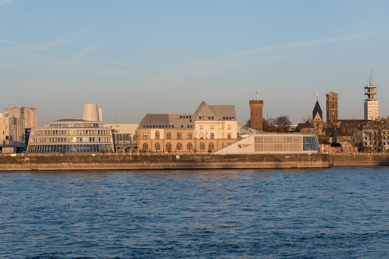 Imhoff-Schokoladenmuseum